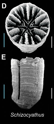 Recorte de ZooKeys-227-001-g016 jpeg para aislar Schizocyathus